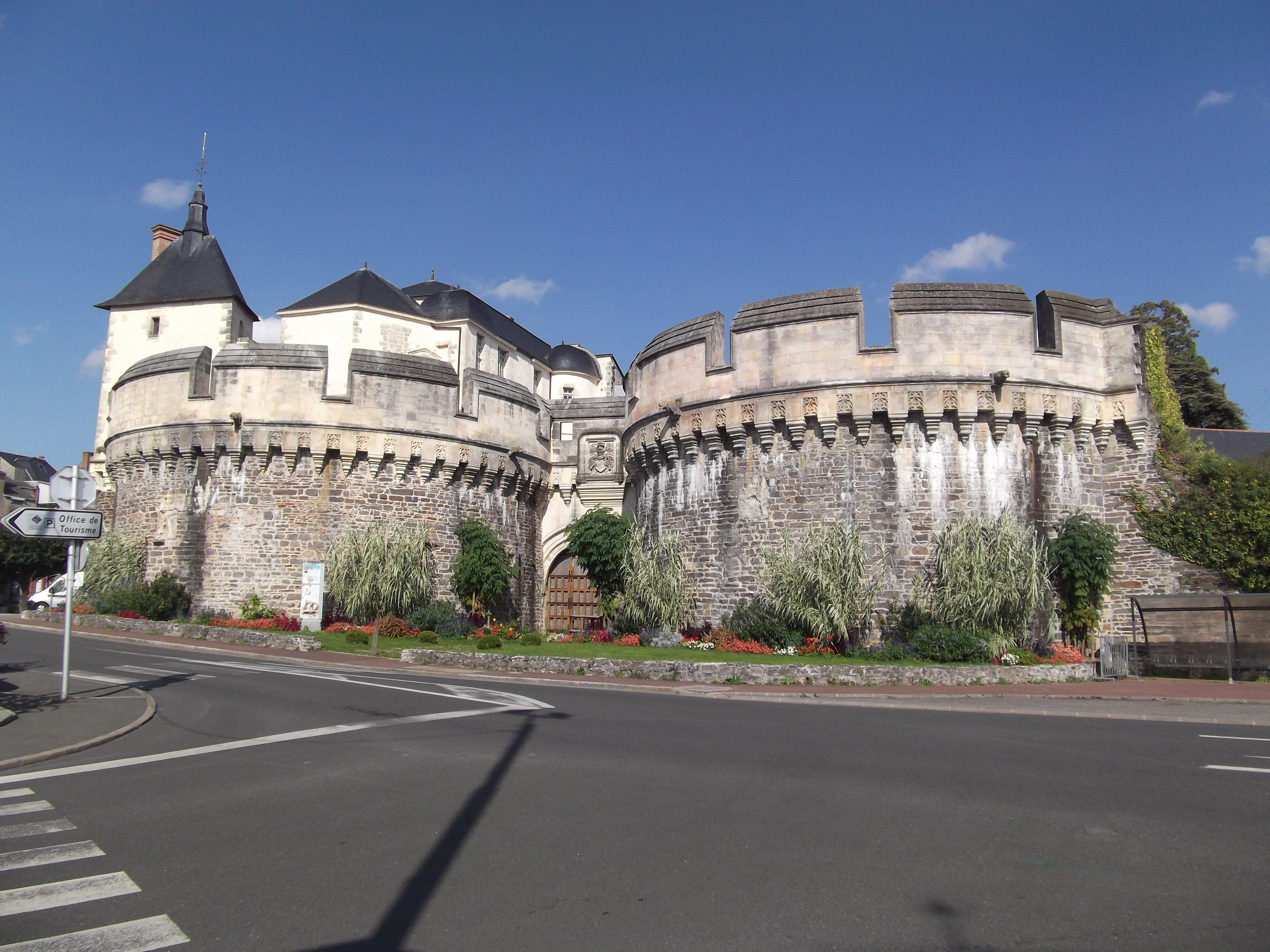 Château d'Ancenis